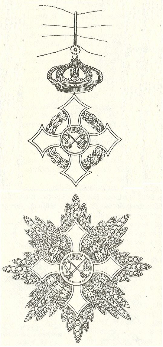 Scan van Blz. 174 van het boek "Handbuch der Ritter- und Verdienstorden " uitgegeven 1893 door Weber.Tekening van de in 1902 overleden Maximilian Gritzner. Robert Prummel 10 jul 2008 16:40 (CEST)